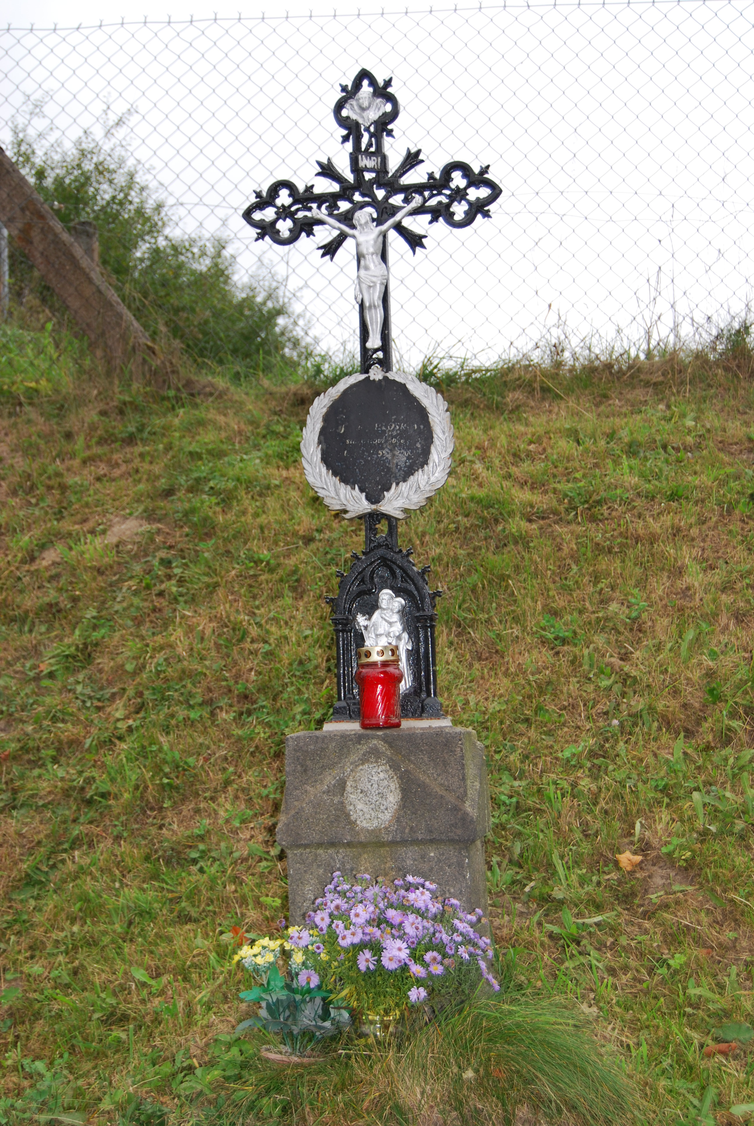 Kříž u silnice z obce. Mokrosuky. Okres Klatovy. Kraj Plzeňský. Česko.